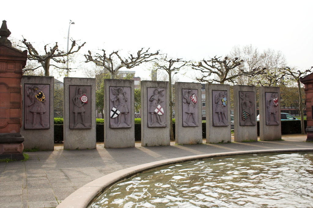 Abbildung der 7 Kurfürsten und des deutschen Königs - Skulpturenzyklus vom ehemaligen Kaufhaus "Am Brand", frühes 14.Jh (Nachbildung am Mainzer Rheinufer - Original im Landesmuseum Mainz)